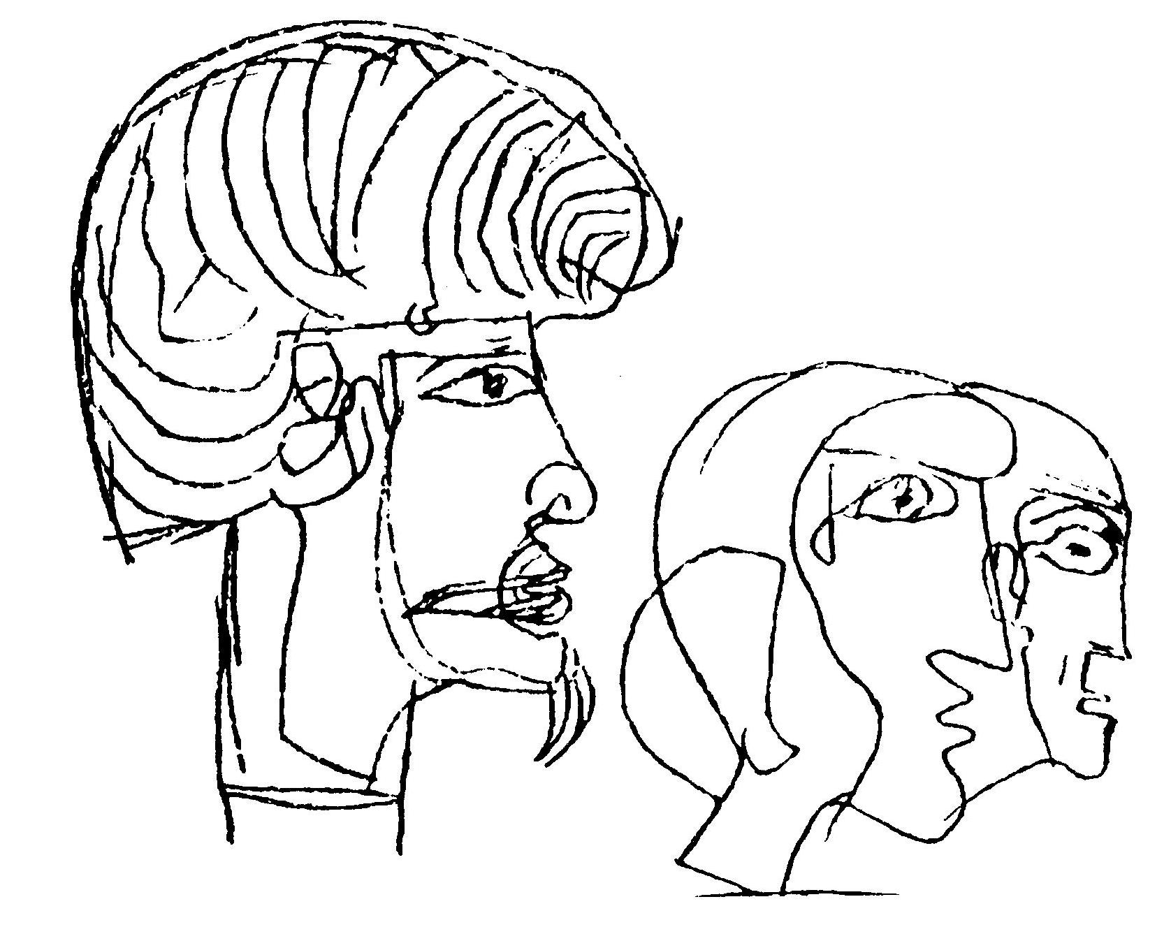 Graffito v pyramidě Senusreta III.